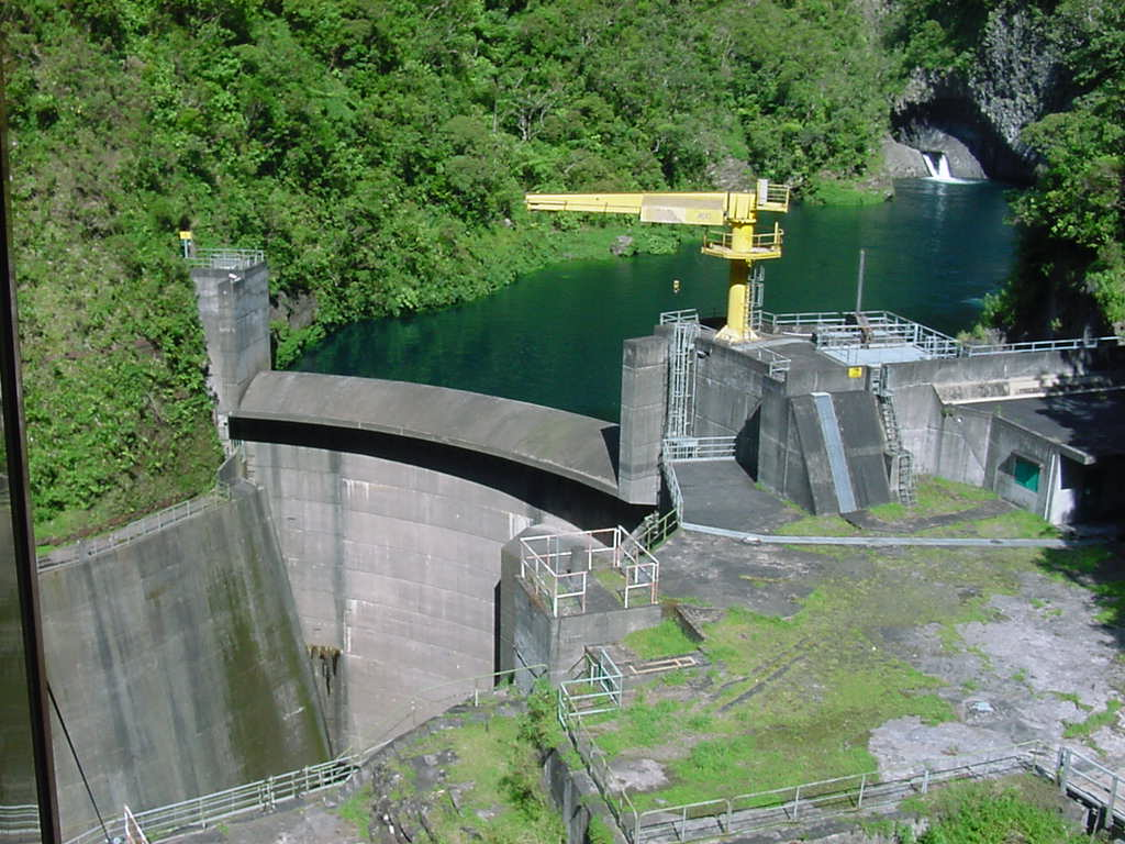 retenue d'eau de l'est de la reunion